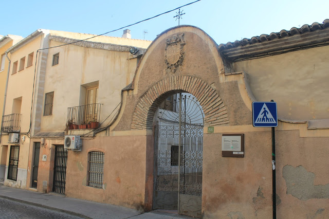 Imagen fachada externa